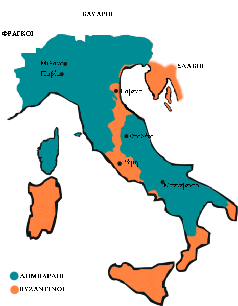 Το Λομβαρδικό Βασίλειο το 744 μ.Χ., χρονιά του θανάτου του Λομβαρδού βασιλιά Λιούτπραντ